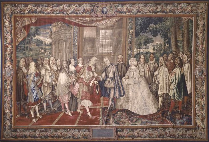 Meeting of Philip IV of Spain and Louis XIV of France 7 july 1660 at Pheasant Island. In crowd - the bride, Archduchess Maria Theresa of Austria and court painter Diego Velasquez. Tapestry. Suite de l'Histoire du Roi, 3e série 2e pièce : "Entrevue de Louis XIV et de Philippe III d'Espagne dans l'Ile des Faisans, le 6 juin 1660" 1665 - 1680